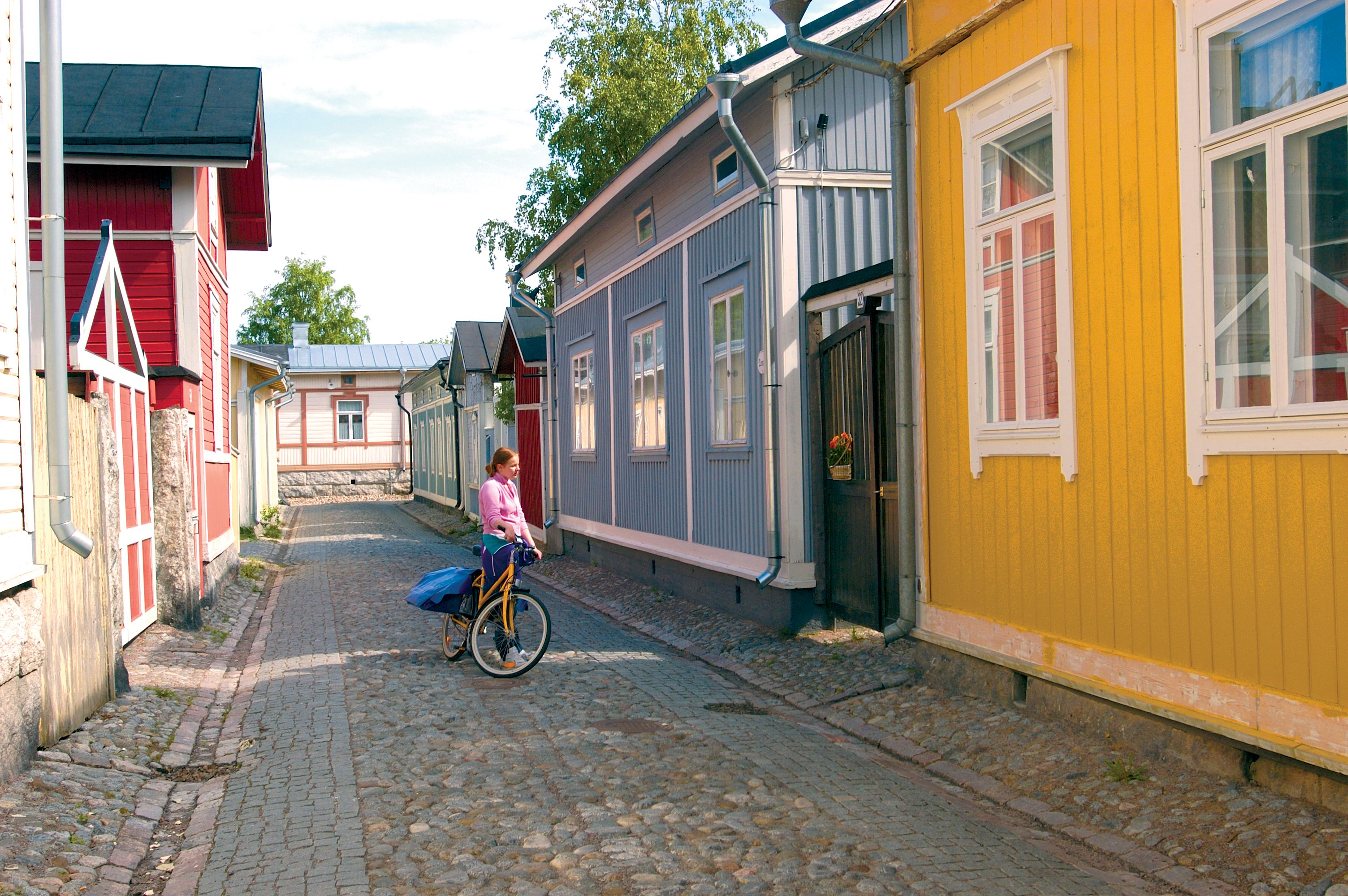 Old Rauma